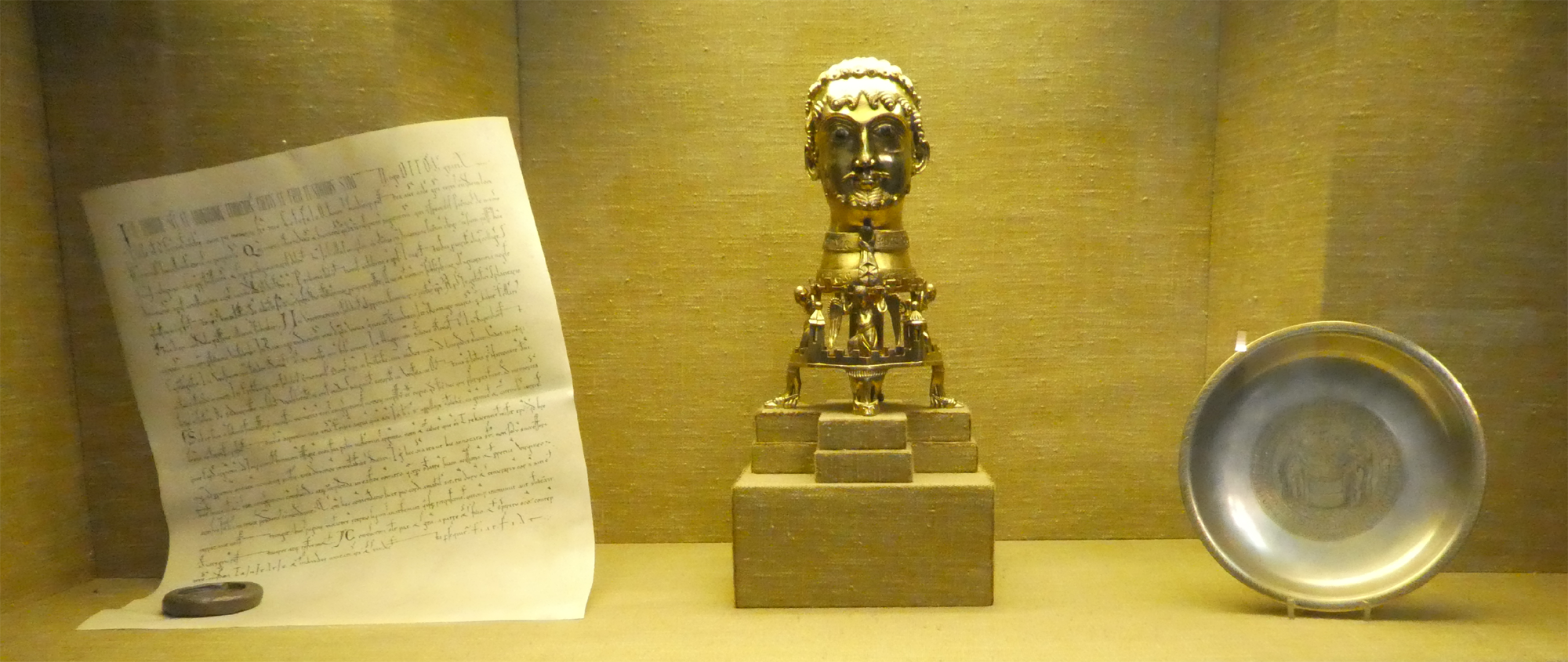 Stiftskirche Cappenberg - "Barbarossakopf", Taufschale (Replikat) und Testament Ottos von Cappenberg (Replikat)